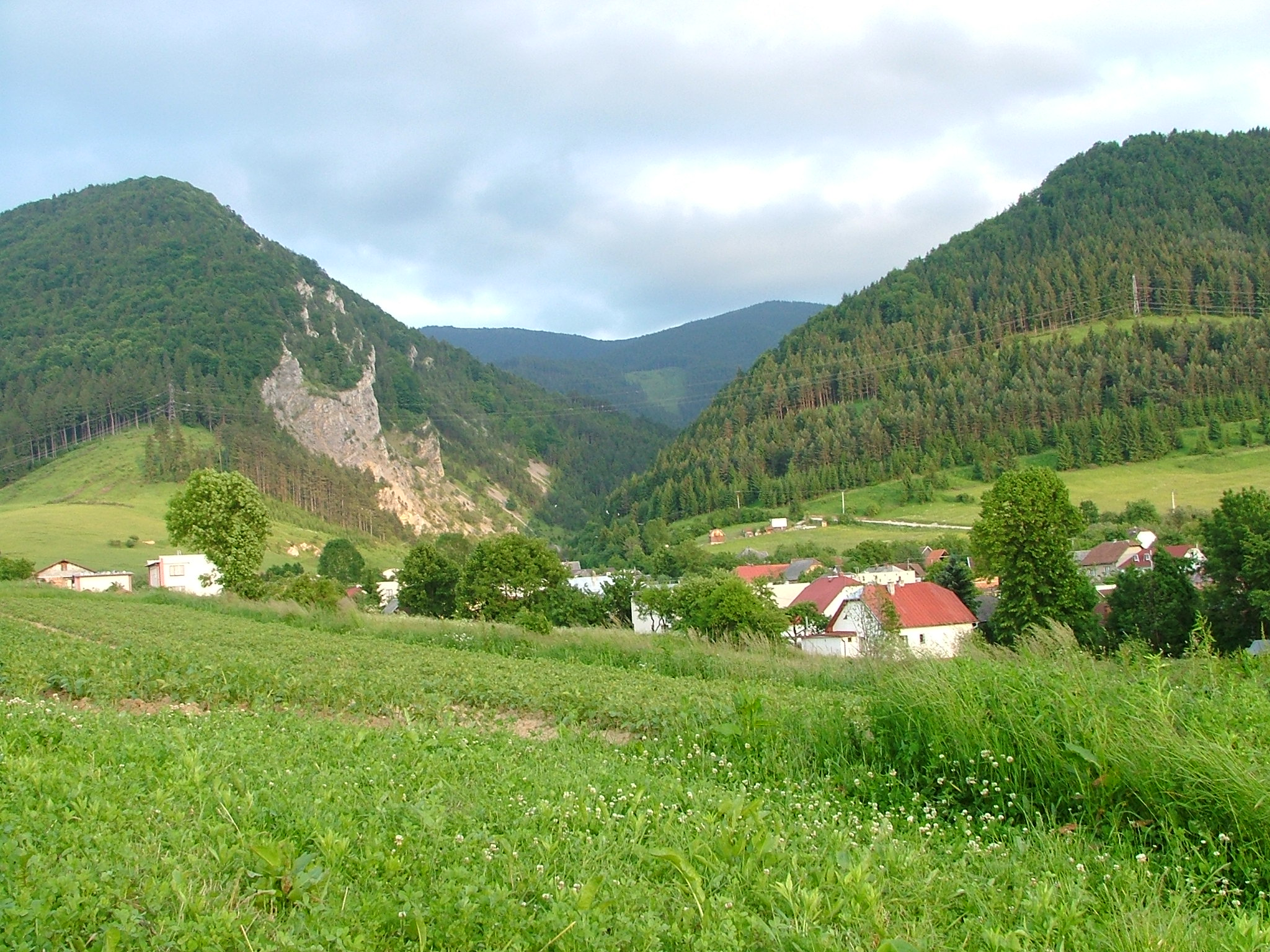 Višňové